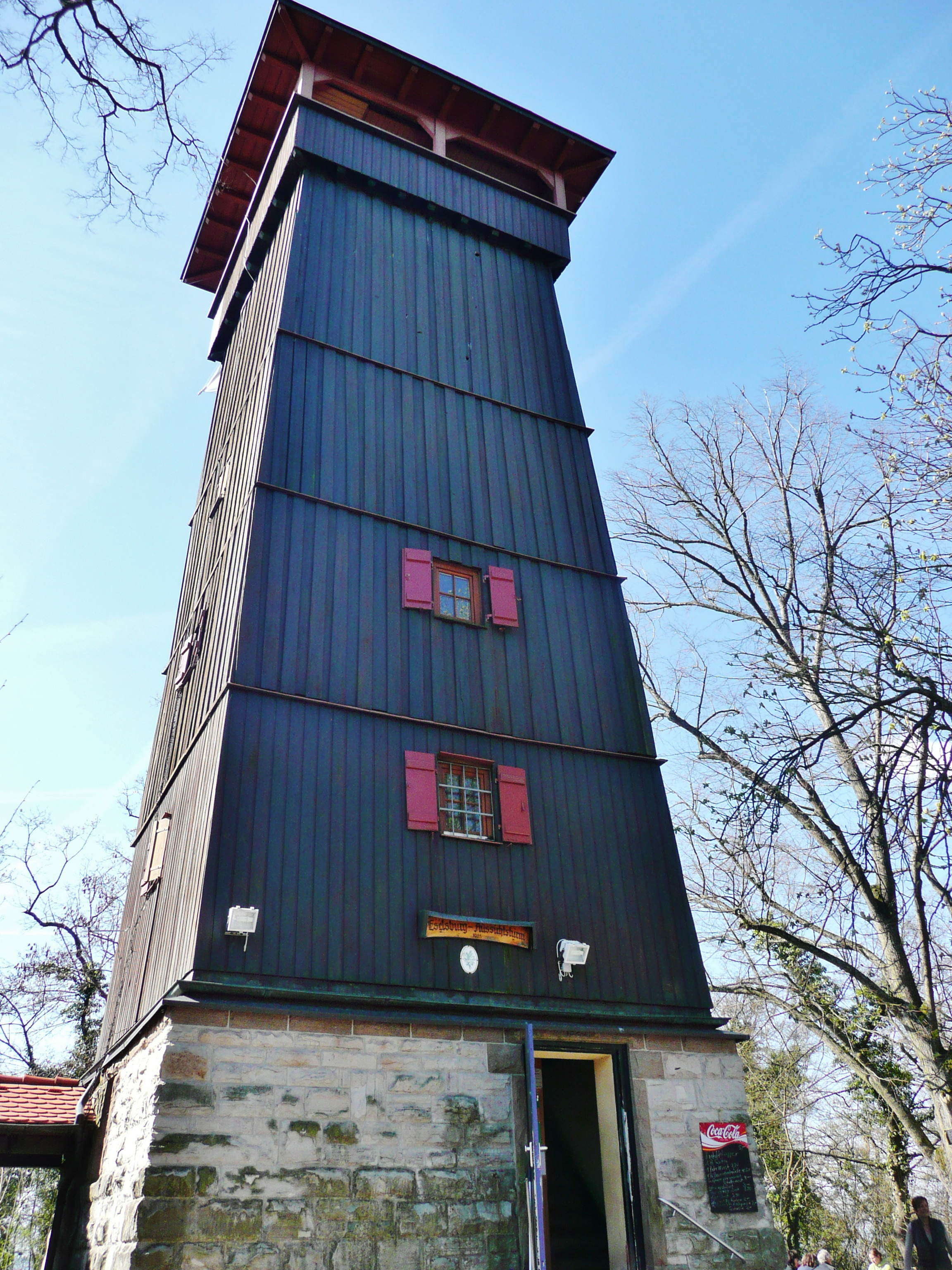 Eselsburgturm oberhalb von Ensingen: Am Ostende des südlichsten der drei Strombergzüge errichtete der Schwäbische Albverein 1925 einen verschalten Holzturm auf einem Werksteinsockel mit einer kleinen Schankwirtschaft und einer offenen Schutzhütte. Die Herren der Eselsburg waren ein mittelalterliches Adelsgeschlecht in Schwaben, die schon vor 1140 eine Burg auf dem Auenbühl bei Rechentshofen (Sachsenheim) besaßen und sich zwischen 1140 und 1194 die Eselsburg erbauten.